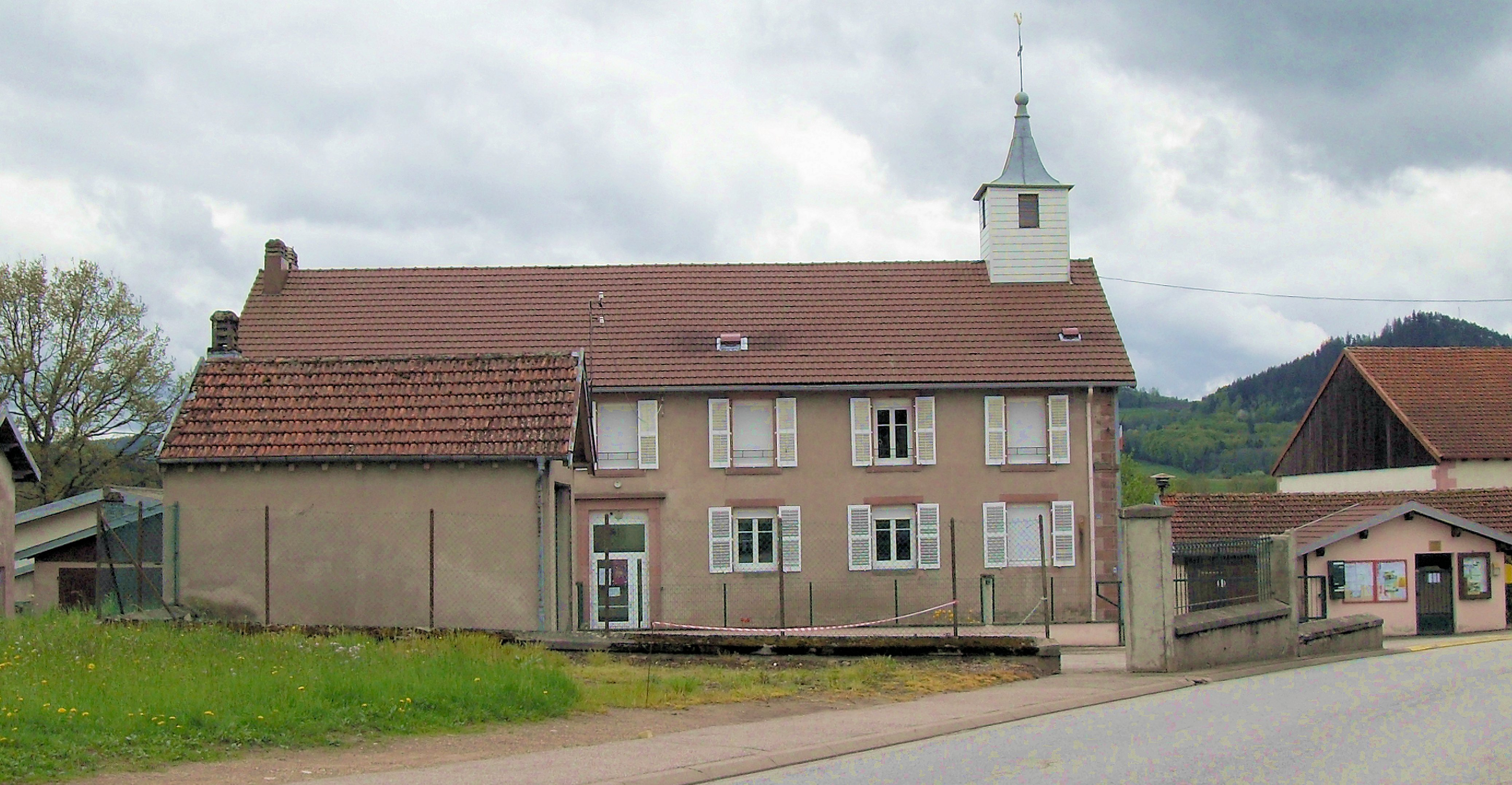 La mairie des Poulières